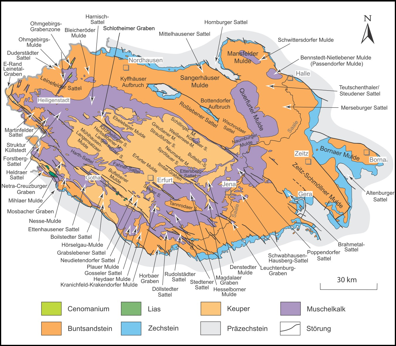 Saxonische Strukturen im Bereich des Thüringer Beckens sensu lato (Auswahl) Darstellung ohne känozoische Bildungen (nach G. SEIDEL et al. 2002; I. RAPPSILBER 2003; G. SEIDEL 2003, 2004)